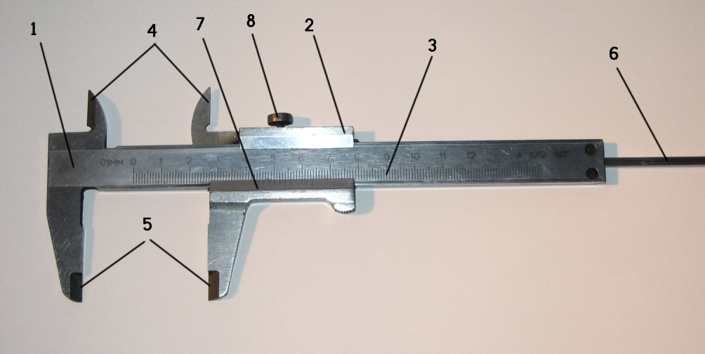 Штангенциркуль